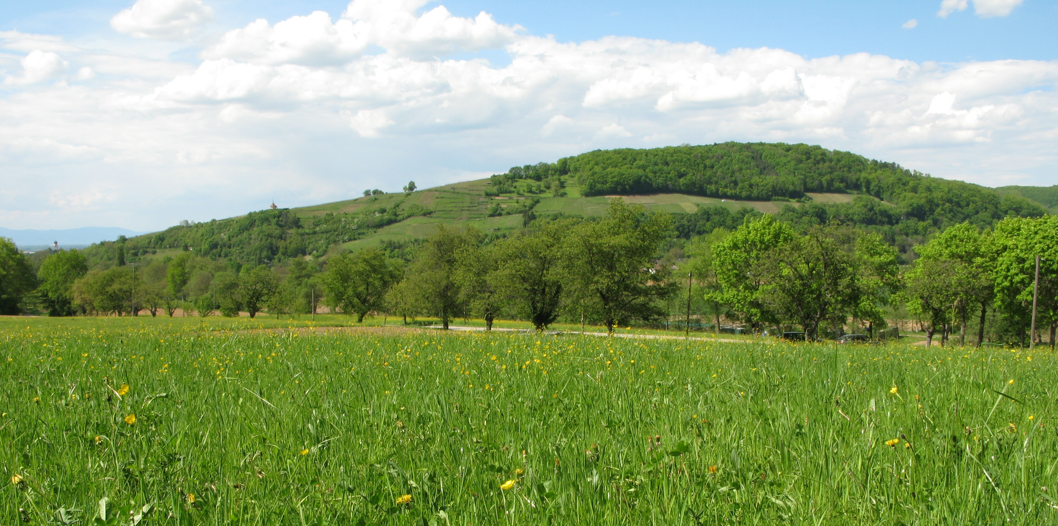 Landschaft mit dem Ölberg bei Ehrenstetten am Fernwanderweg Markgräfler Wiiwegli im Markgräflerland.